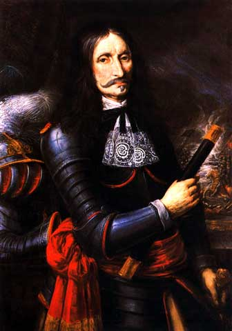 Das Porträt zeigt den Reitergeneral Georg von Derfflinger im Alter von 64 Jahren